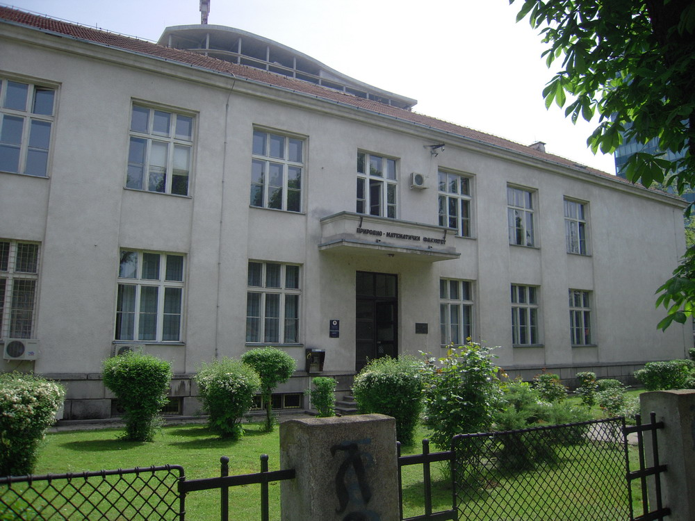 Prirodno-matematički_fakultet (Banja Luka)